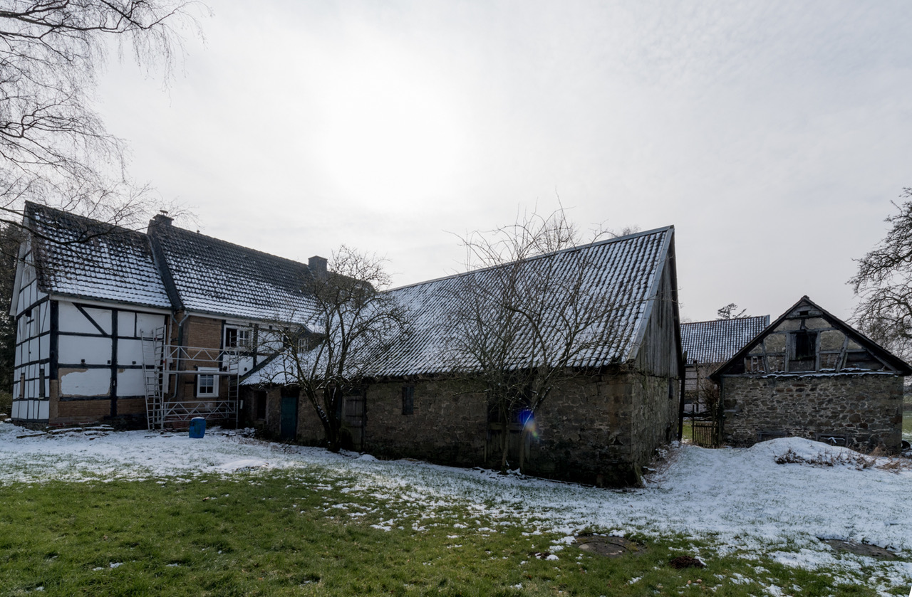 Gut Haswinkel